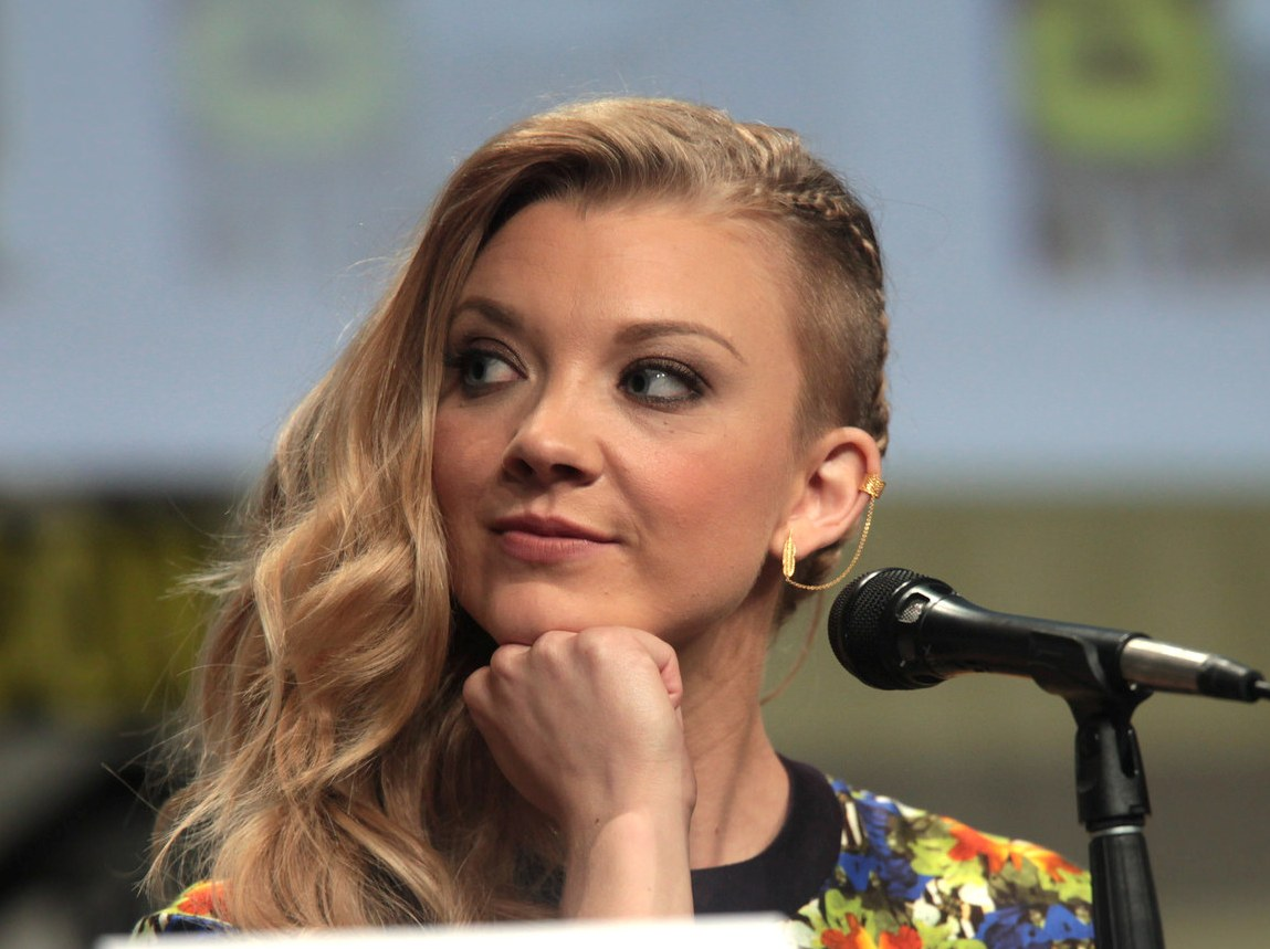 Natalie Dormer à la Comic Con 2014 de San Diego